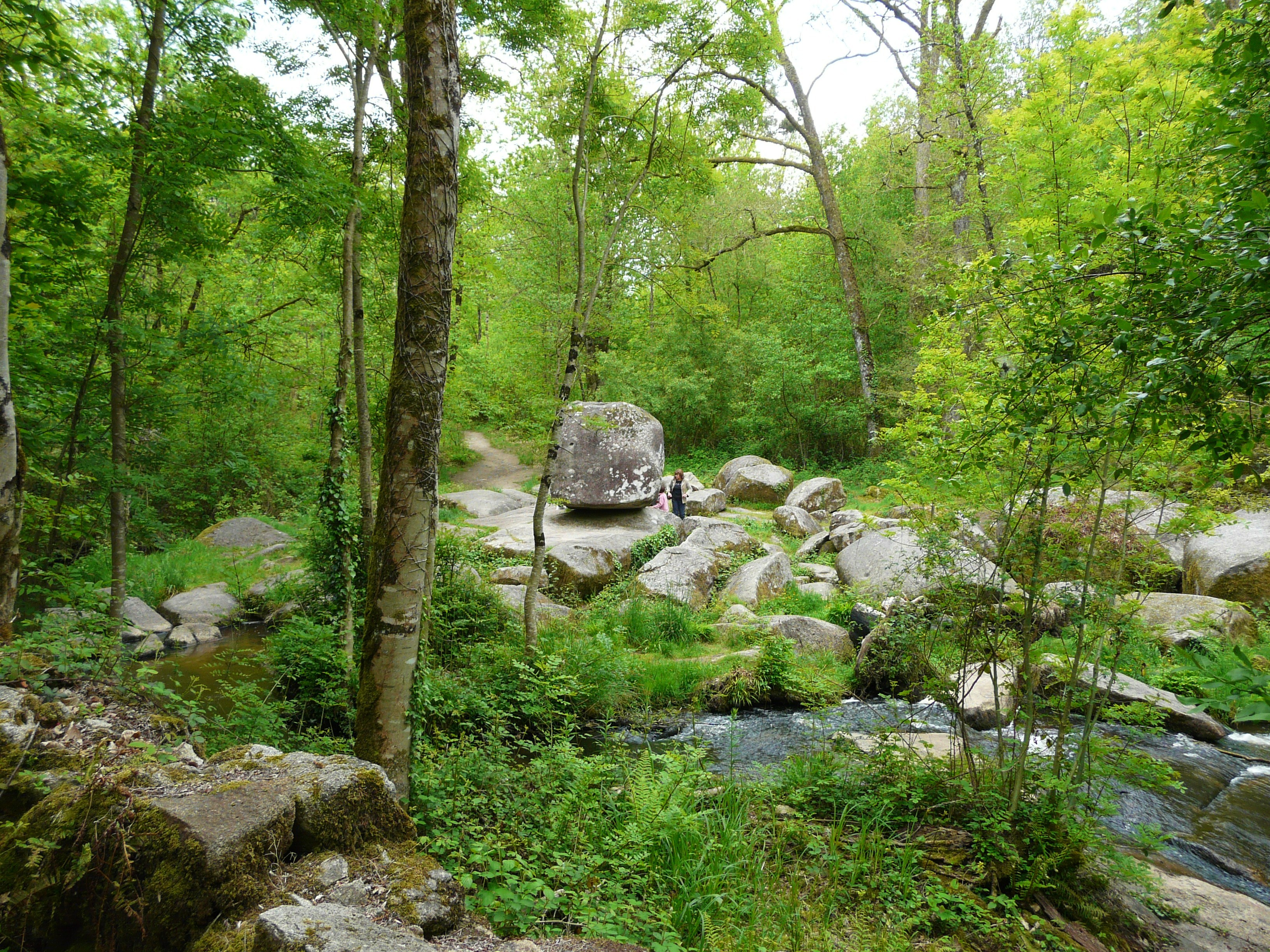 Au premier plan, le ruisseau la Doue passe devant le Roc branlant, Saint-Estèphe, Dordogne, France.